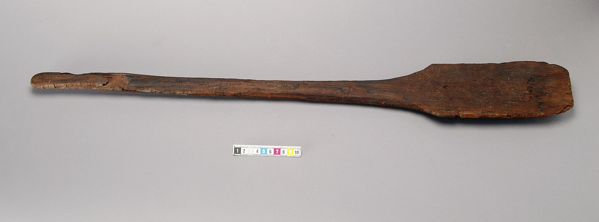 Paddelåra av furu 9499 f.Kr. - 6800 f.Kr. i Västerbyn, Åkermyren, Dalarna, Sverige. Äldre mesolitikum